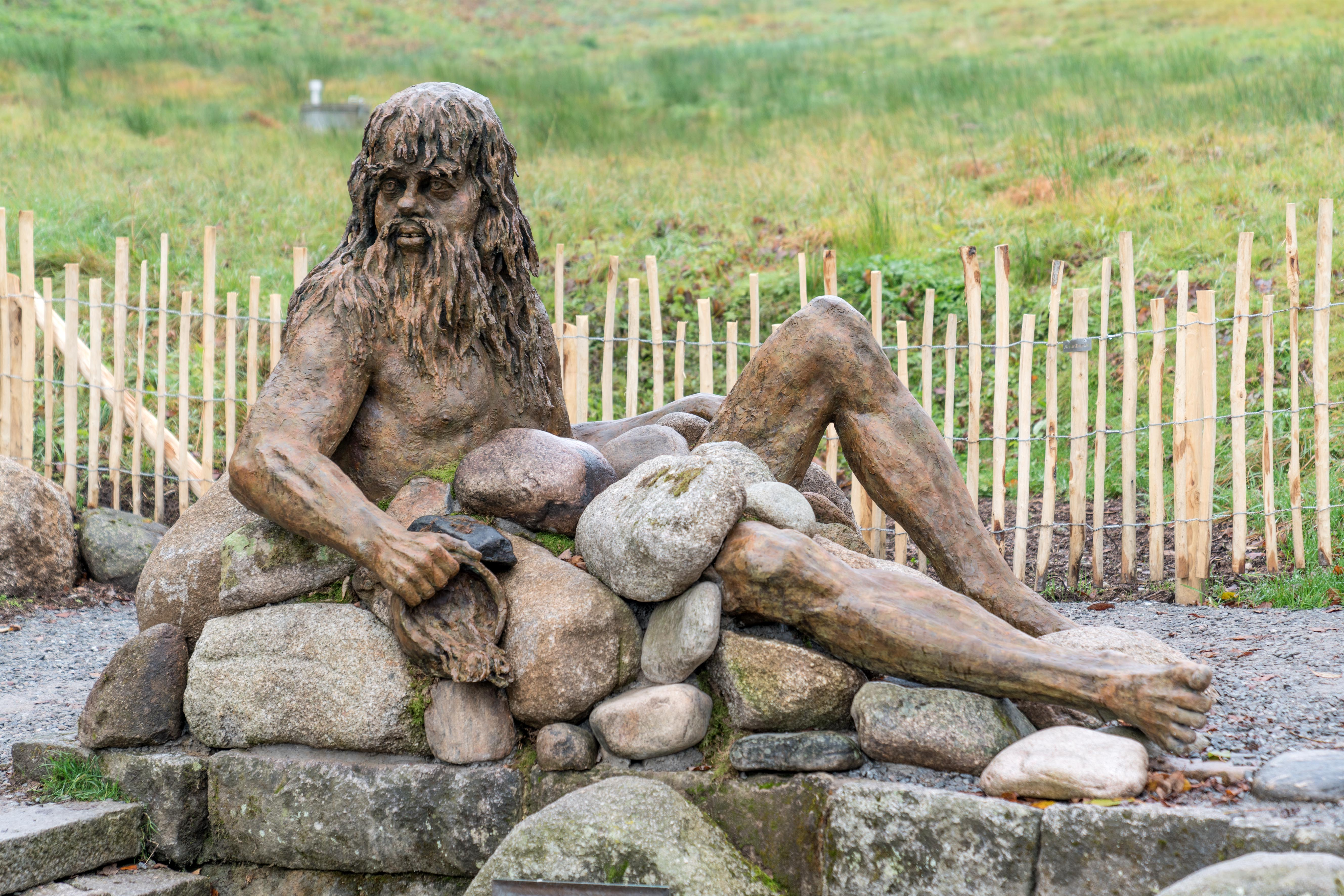 Bronzeplastik des Flussgottes Danuvius geschaffen von Bildhauer Wolfgang Eckert